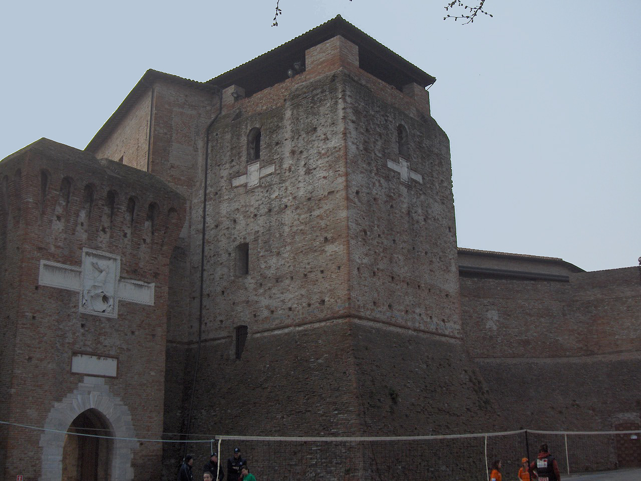 Rimini castle (Castel Sismondo) (1437-1446), Rimini, Italy